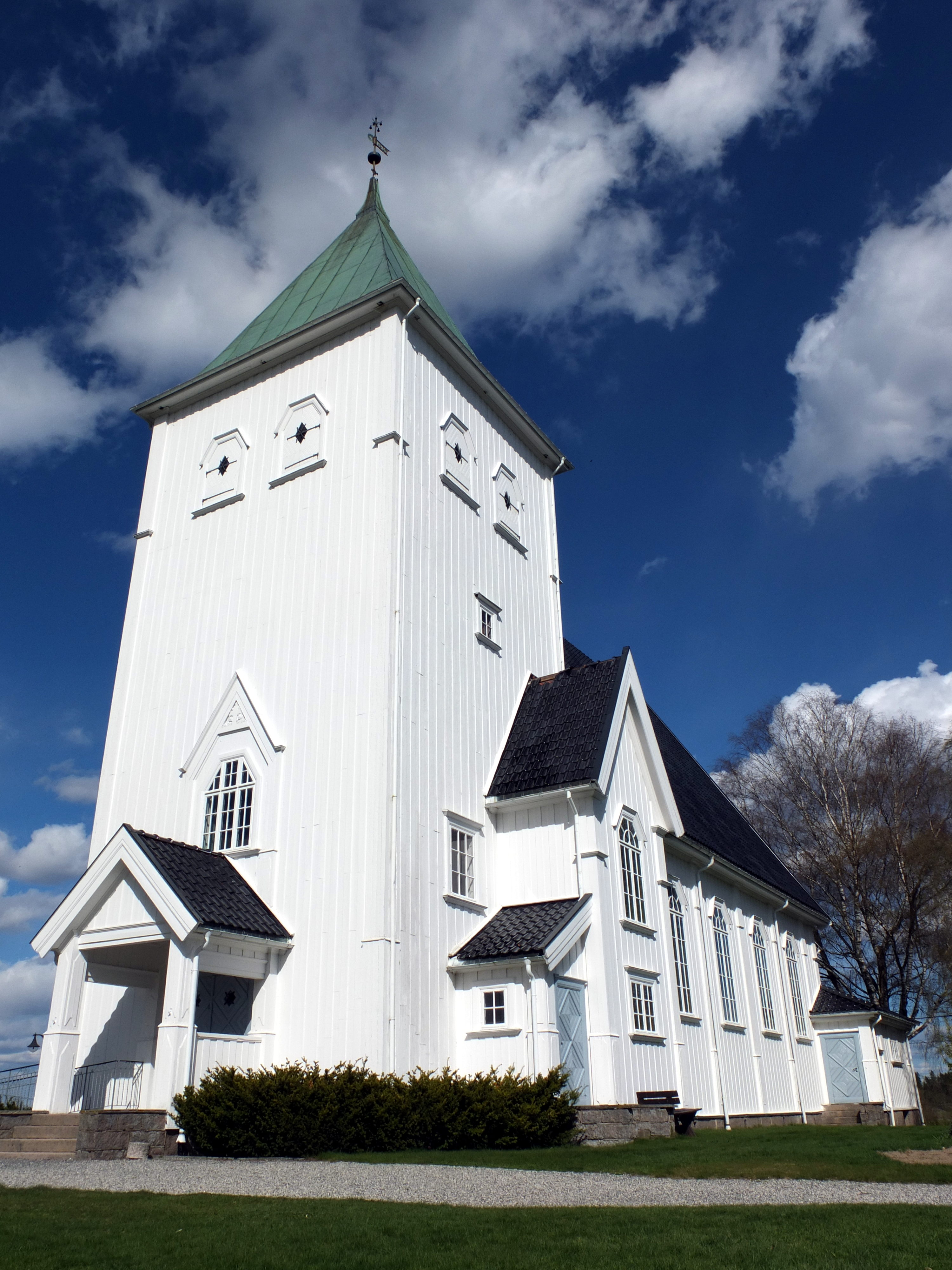 Sørum kirke